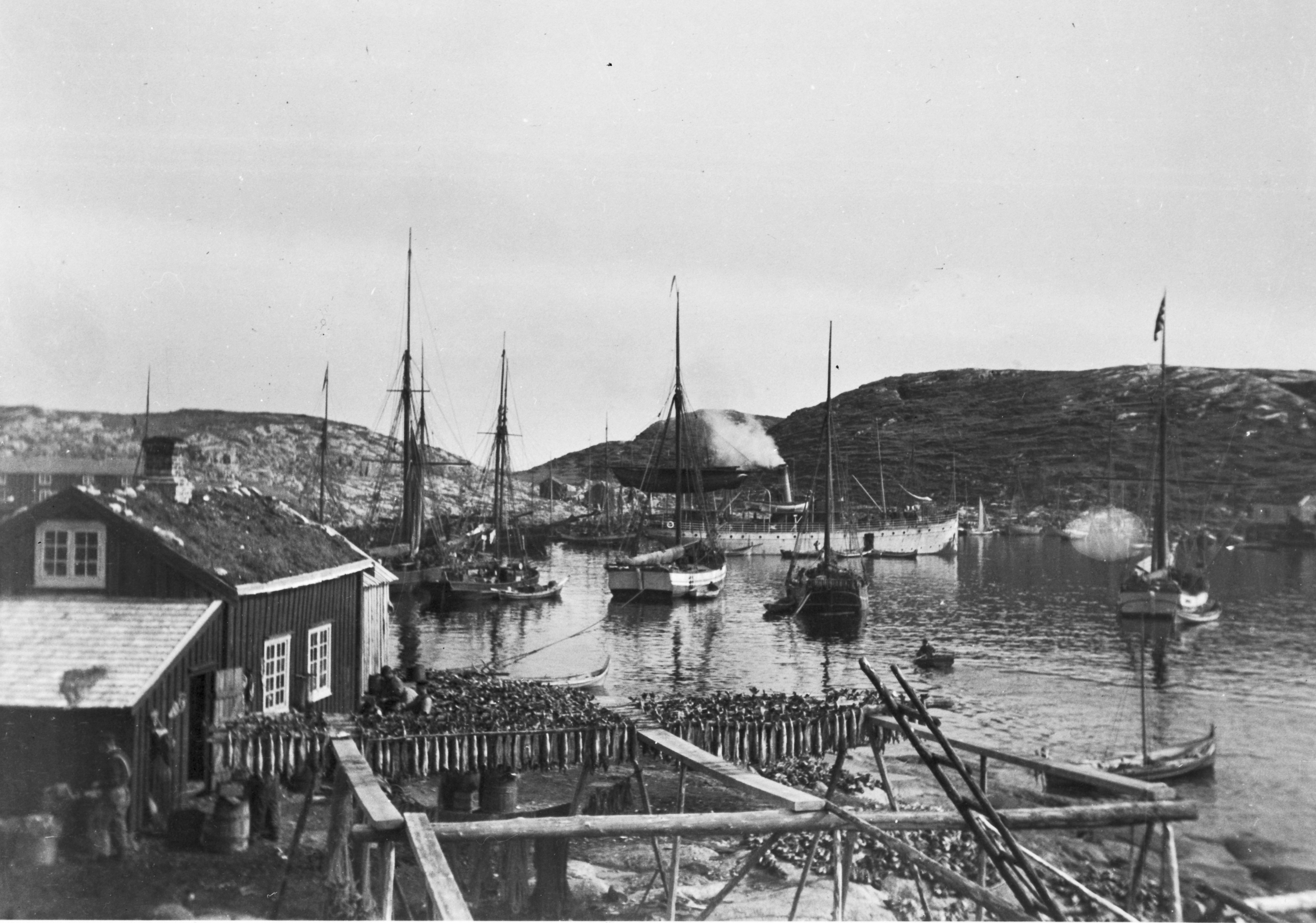 Fiskebåter og oppkjøpsfartøyer side ved side. På havna ligger den gamle rutebåten Herlaug. Rorbua i forgrunnen er Helgebua. Den ble satt opp i 1855. Eier var helge Andersen, og da han døde ble huset brukt som rorbu. I bakgrunnen er Heimværet og Hylla til venstre ble senere fullt utbygget med naust og rorbuer. I forgrunnen henger fisk til tørk.